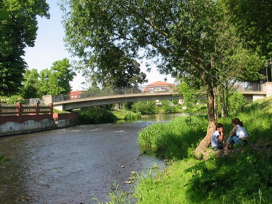 Heutige Ziegelhofbrücke in Perleberg, Brandenburg